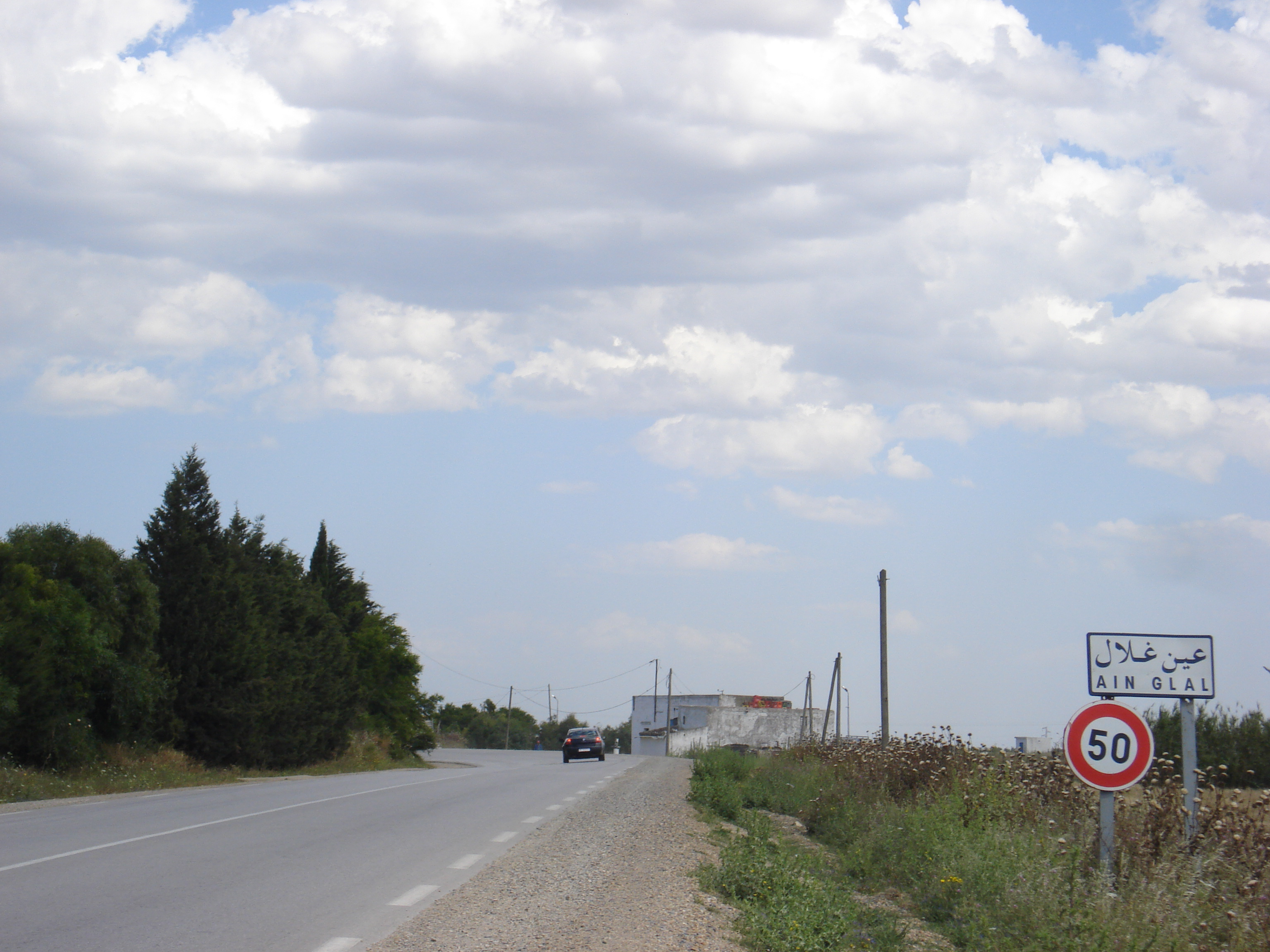 Ain Glal village, Tunisia.